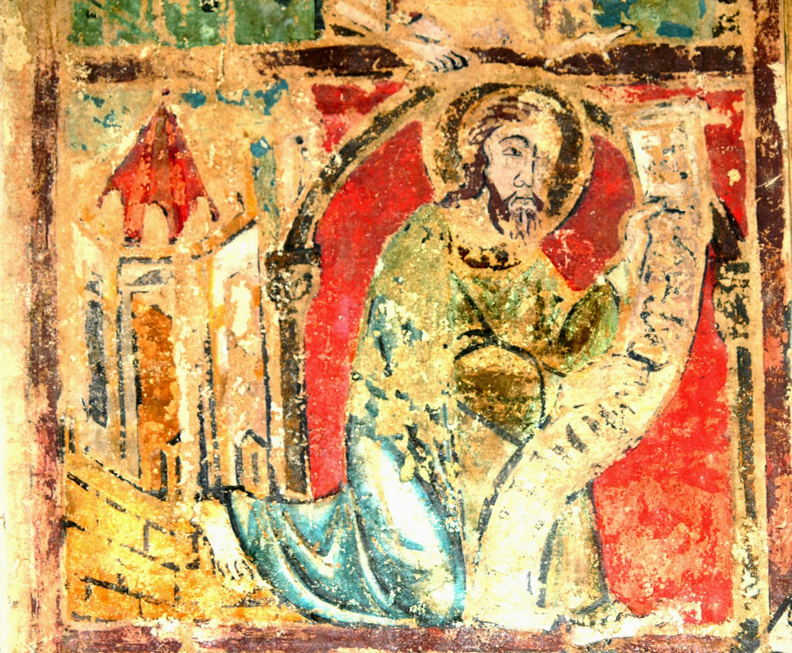 Fragment